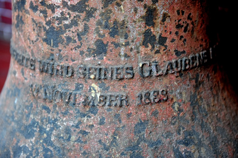 青岛圣保罗教堂大钟钟面文字